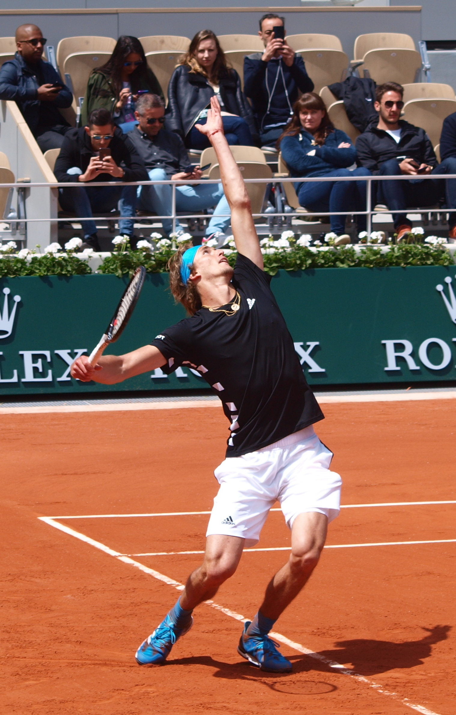 Alexander Zverev, sur le court Chatrier du stade Roland Garros, le 28 mai 2019